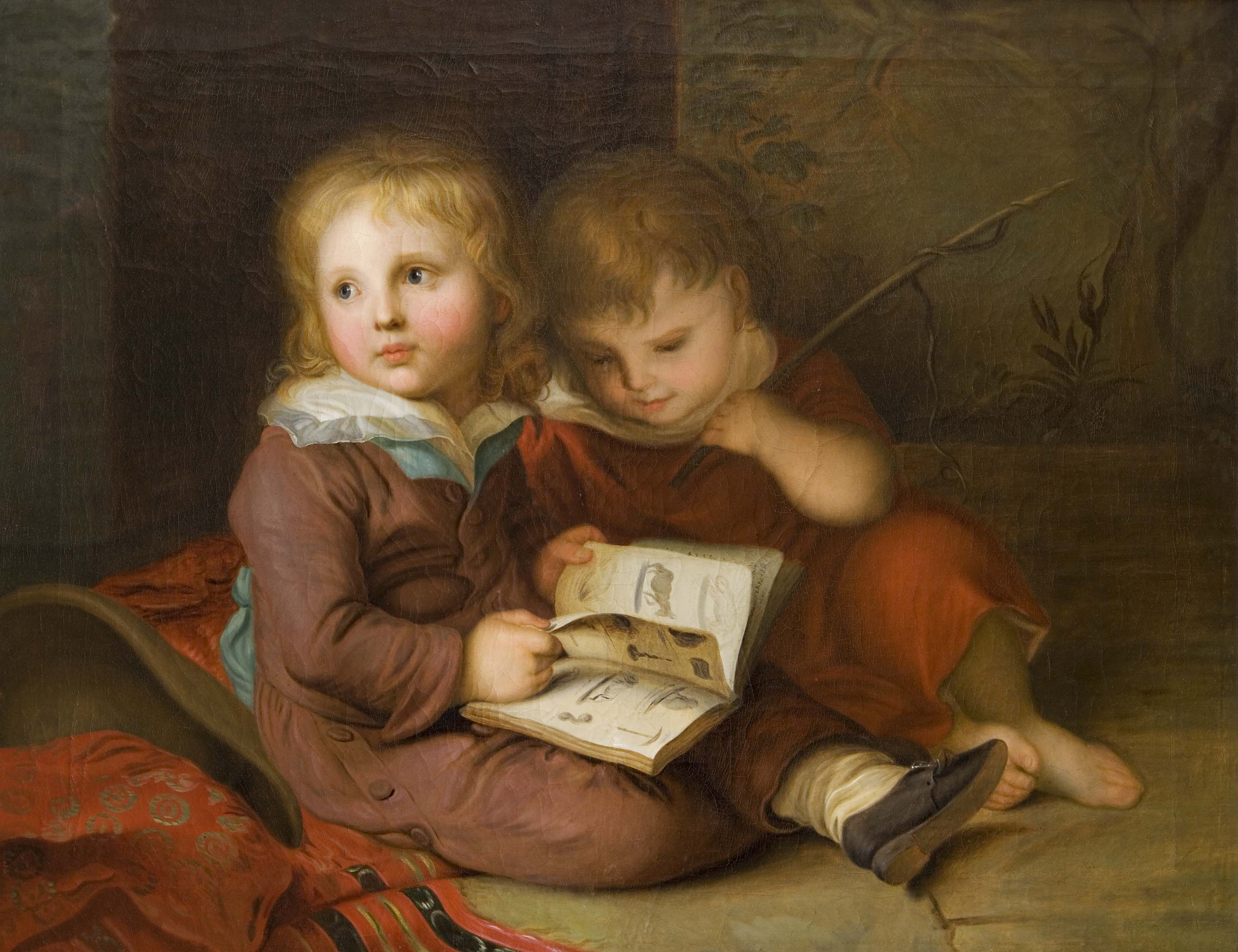 "Die Söhne des Künstlers" (der spätere Maler Carl Christian Vogel und der jüngere Sohn Friedrich Vogel); mit einem Bilderbuch; eine von angeblich 18 eigenhändigen Versionen, Öl auf Leinwand, unsigniert, 67.5 x 85 cm